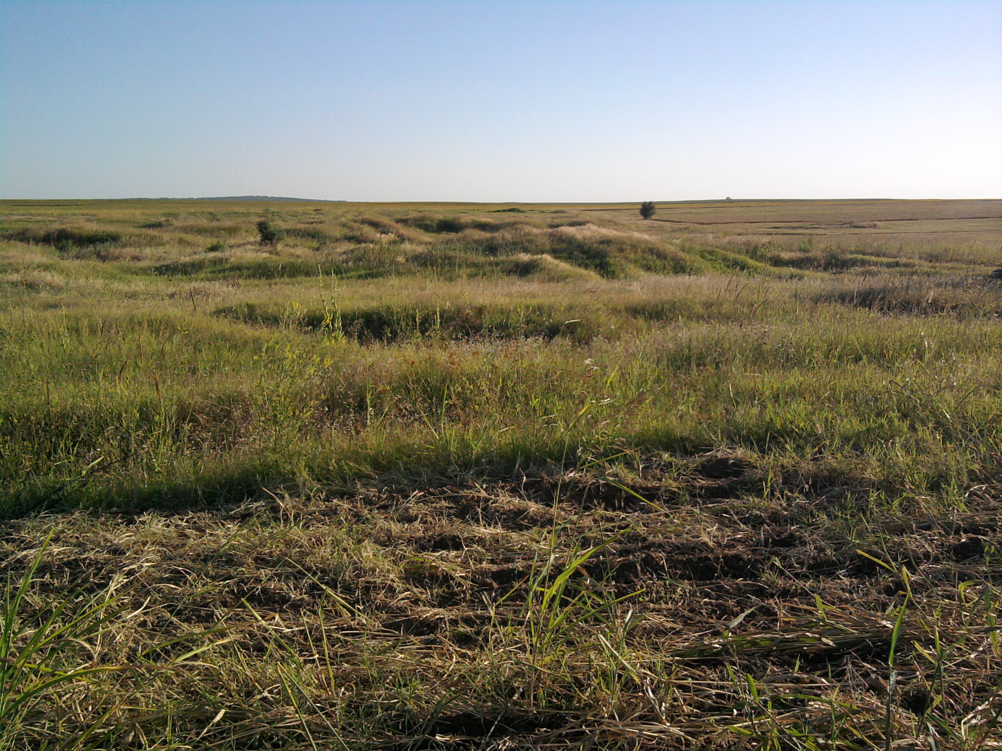 Settlement from the Bronze Age in Novo Selo, Vidin district